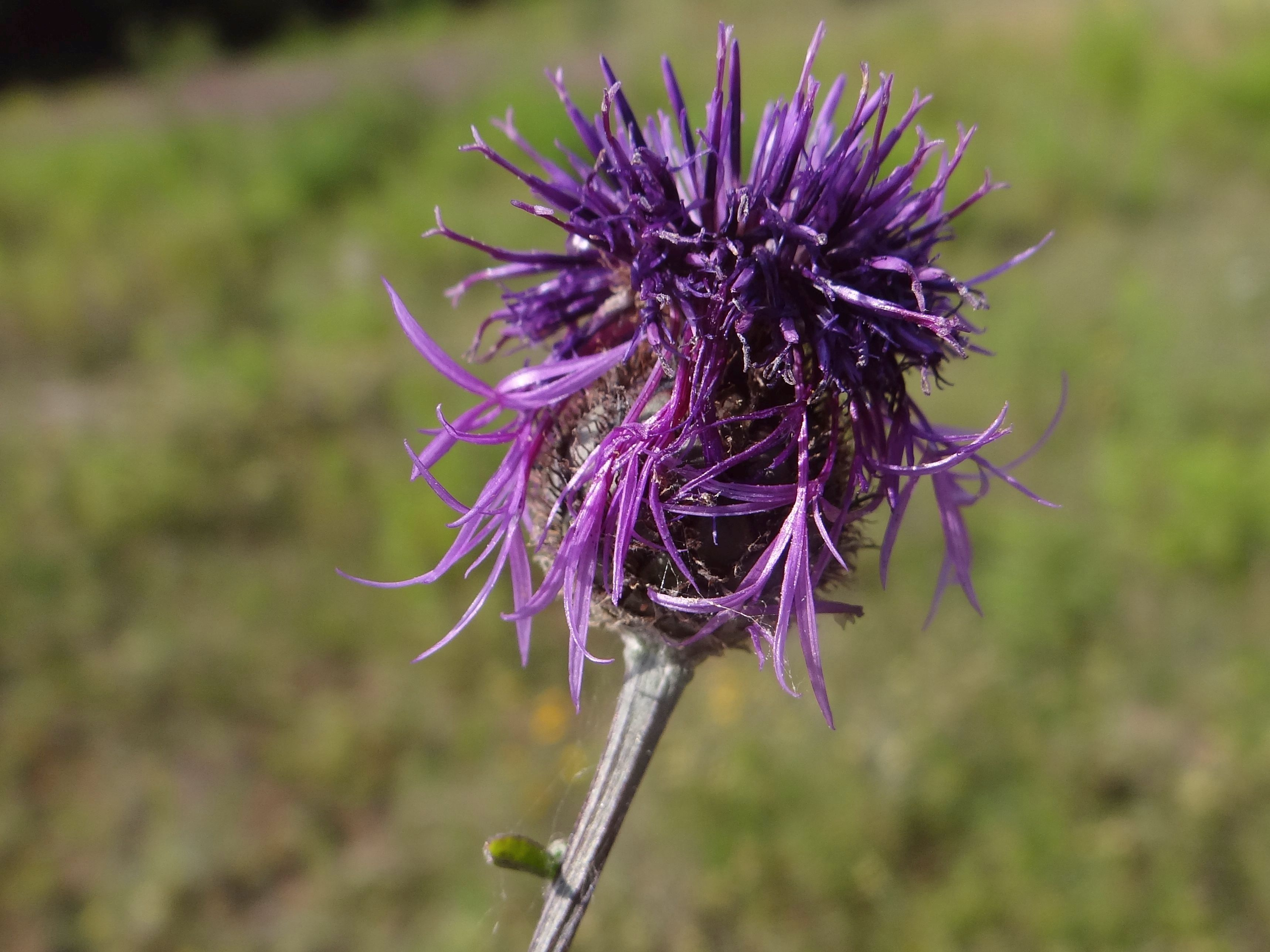 Centaurea scabiosa. Location: Poland, Podzamcze (województwo śląskie)